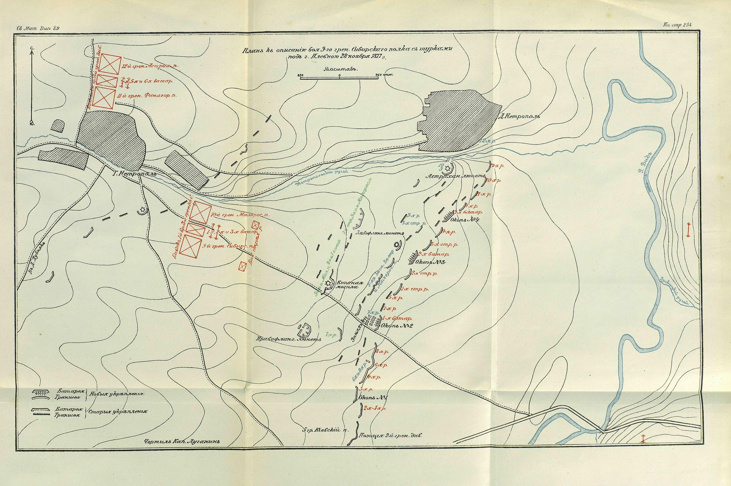 Карта на бойното поле край Долна Митрополия